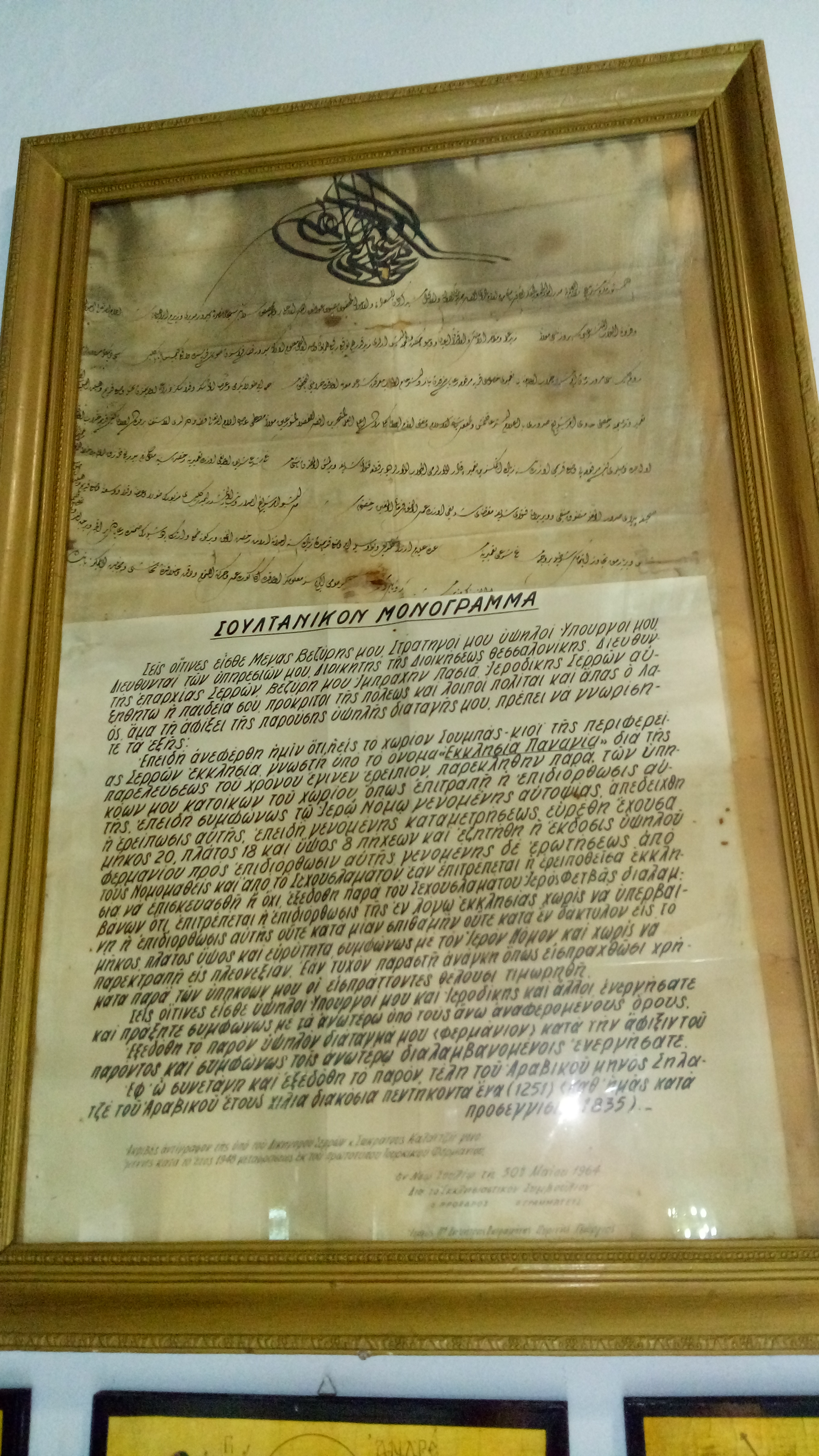 Σουλτανικό μονόγραμμα που δίνει την άδεια για την επιδιόρθωση του τότε ρειπωμένου Ναού της Κοιμήσεως της Θεοτόκου του 1835.